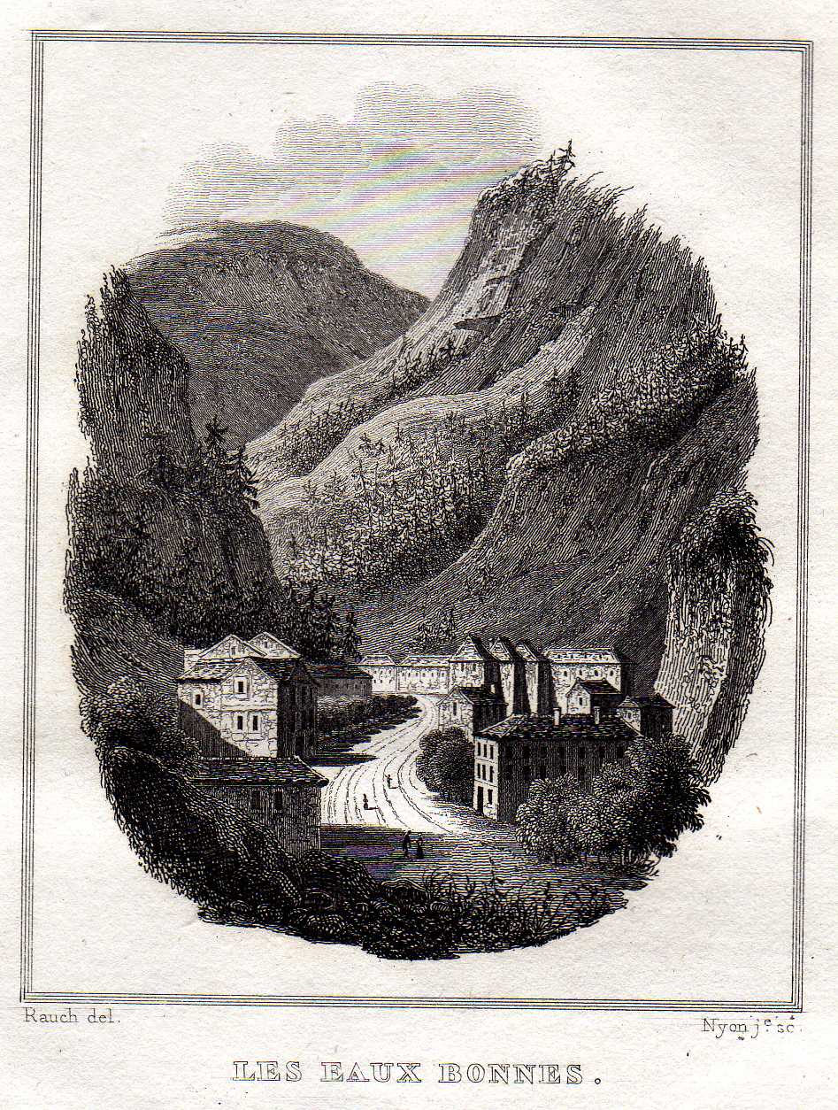 Eaux-Bonnes, Pyrénées Atlantiques, France - Gravure de 1838, vue vers le nord-ouest.